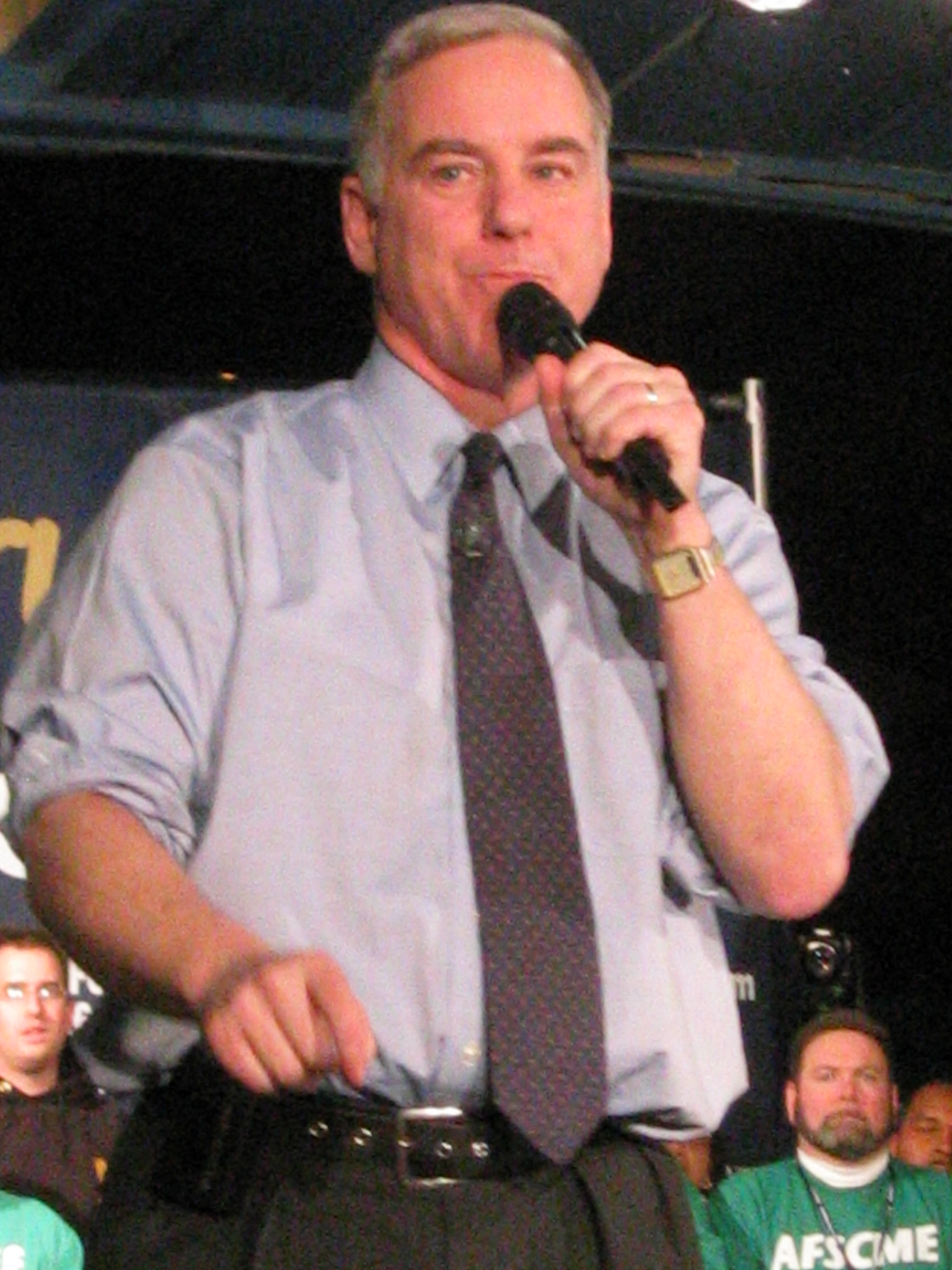 dean